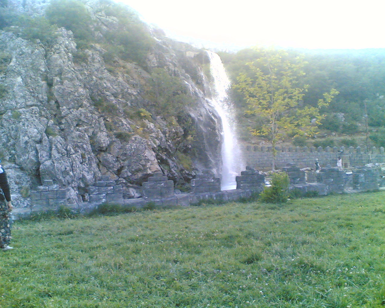 Konya'dan bir görüntü